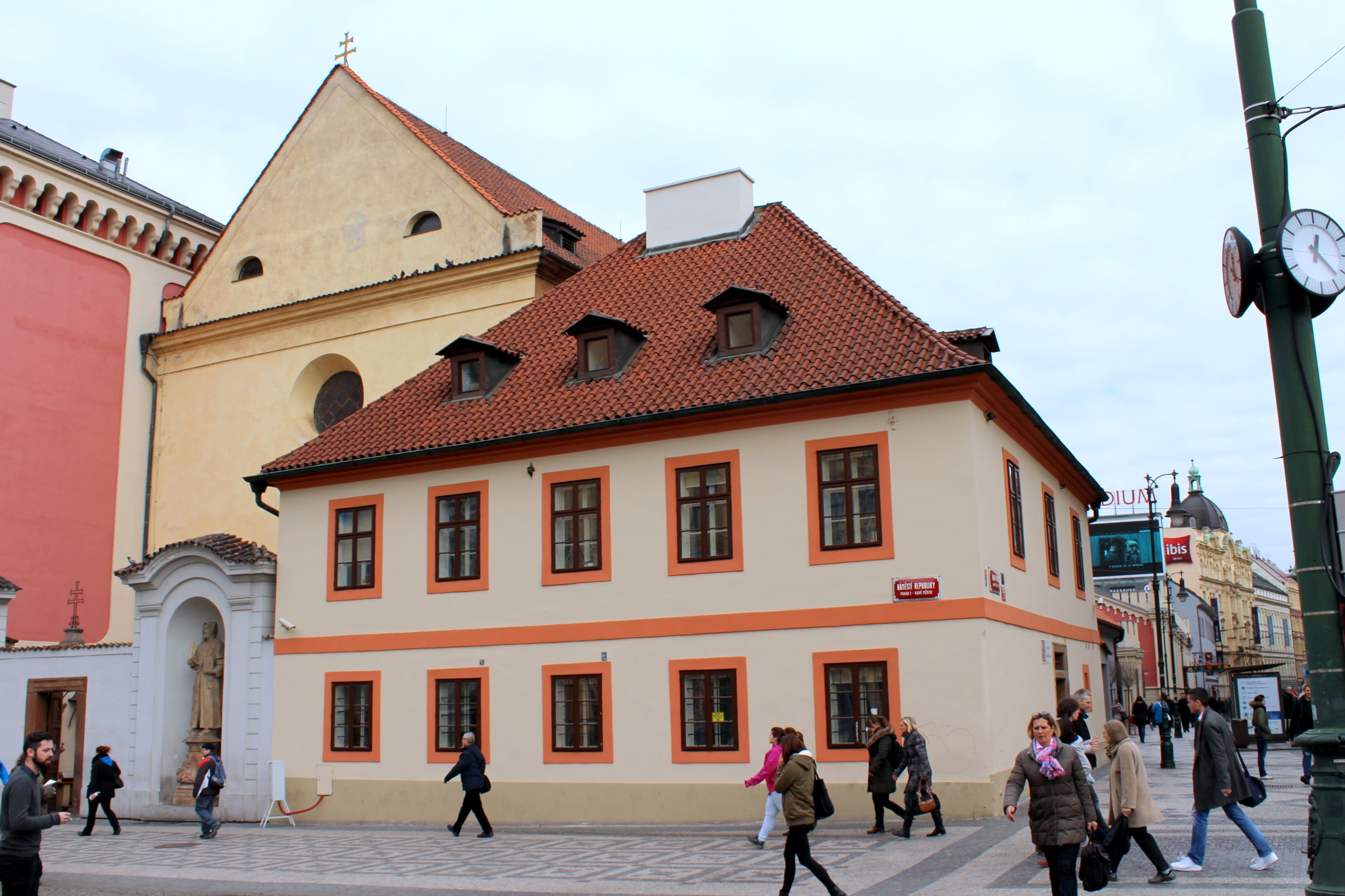 Kapucínský kostel sv. Josefa